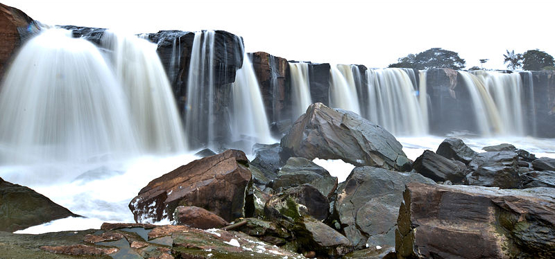 Thika, Kenya, Africa 05 August 2012